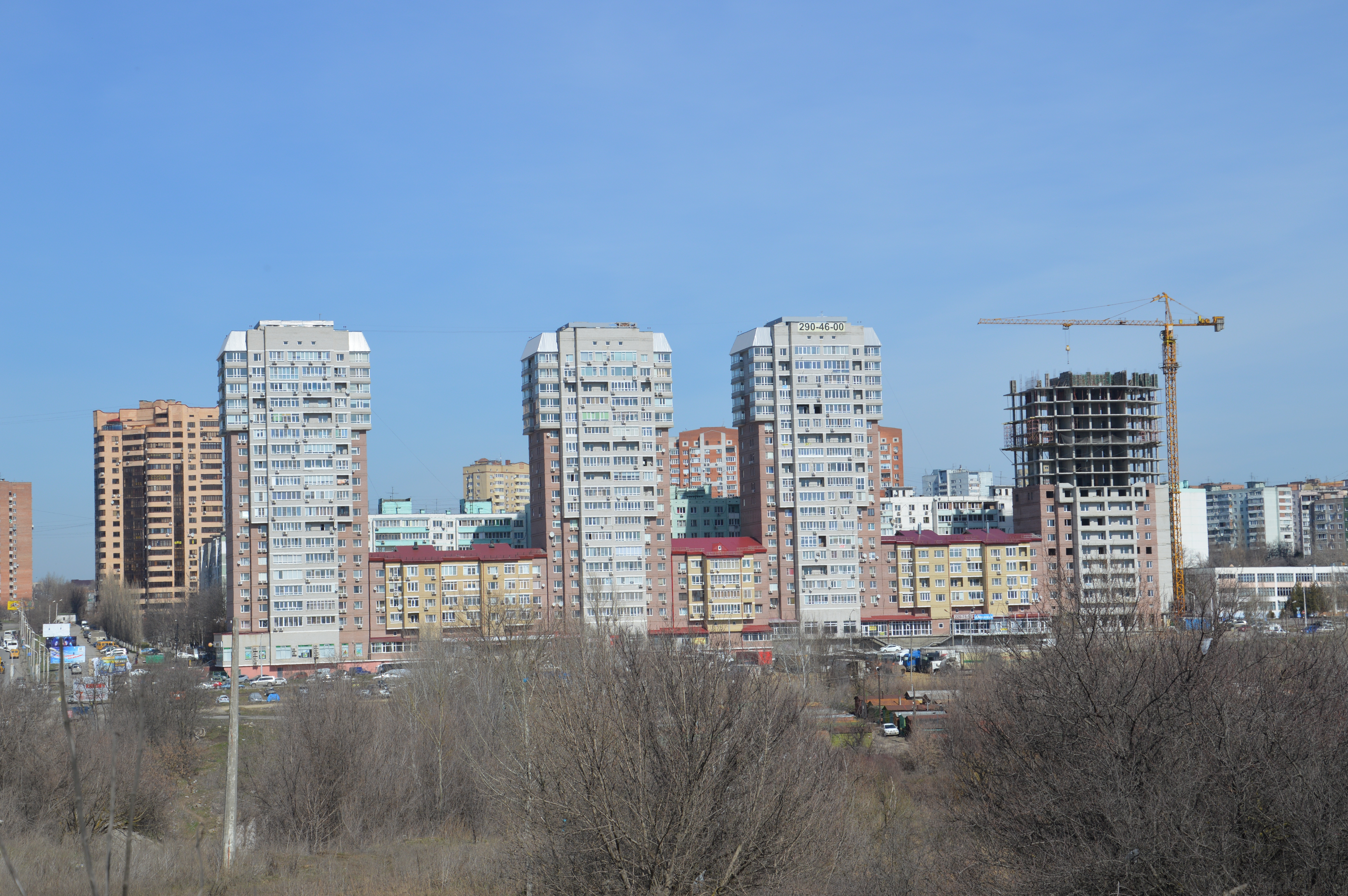 Северный жилой массив